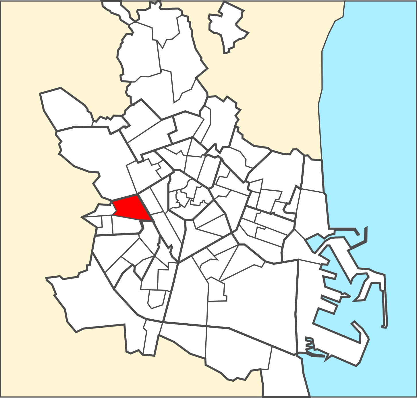 Localització del barri dins de la ciutat de València.